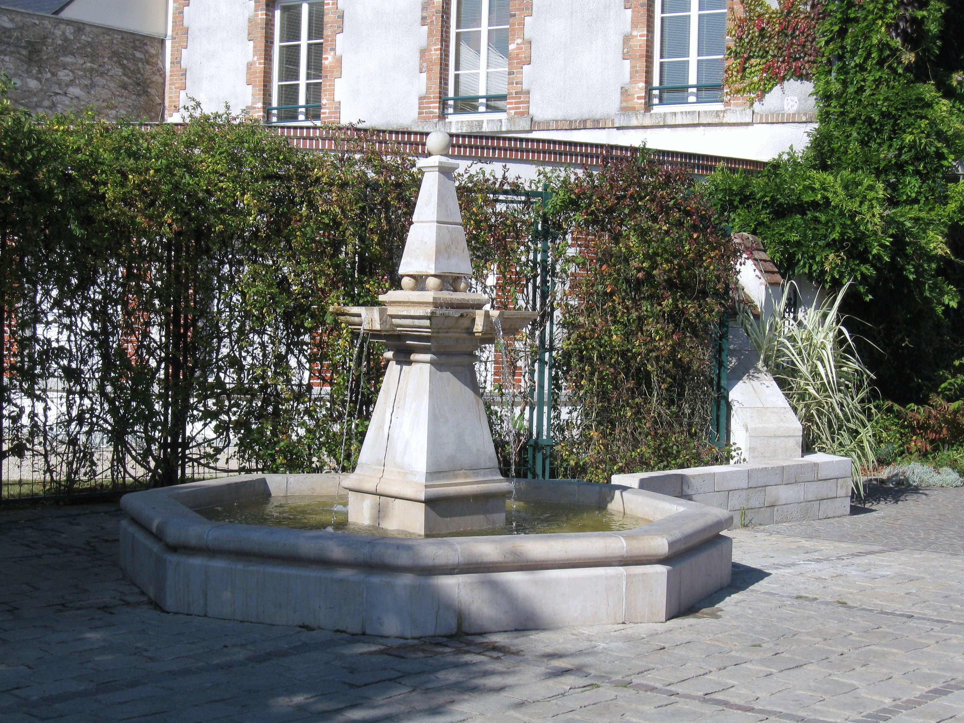 Fontaine sur la place de l'église, Saint-Denis-en-Val, Loiret, France